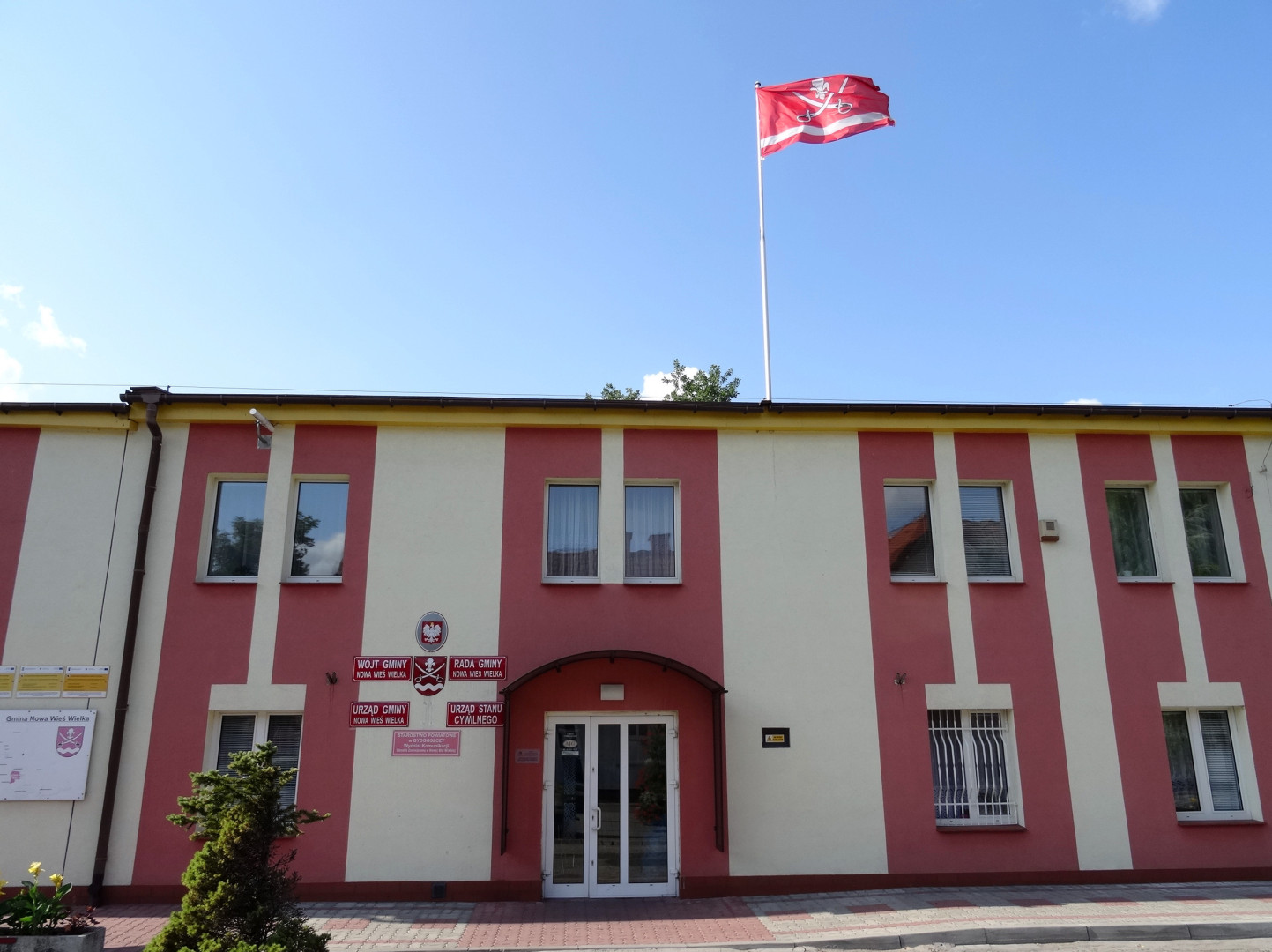 Budynek, w którym mieści się Urząd Gminy, Rada Gminy i Wójt Gminy Nowa Wieś Wielka, powiat bydgoski